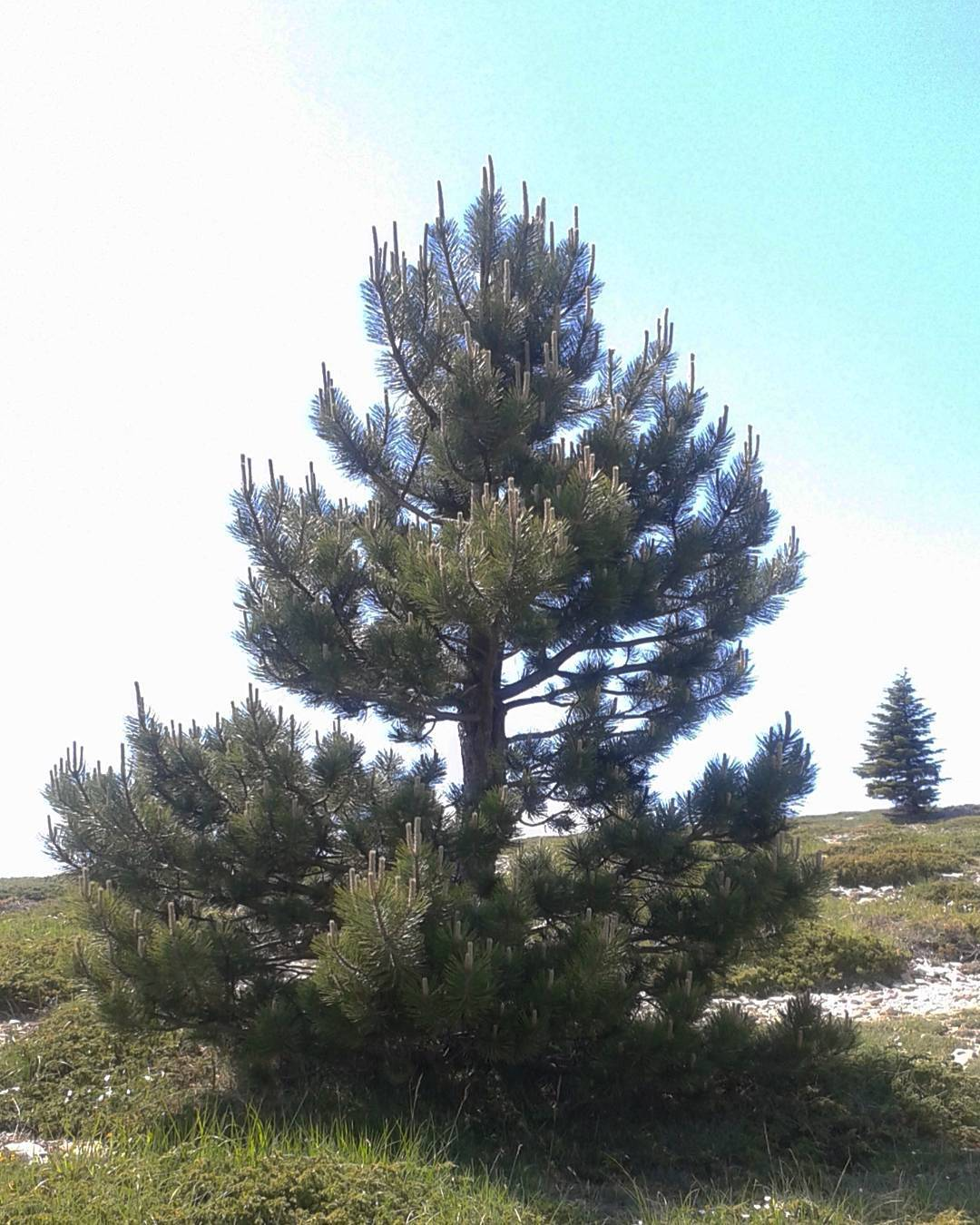 Pin, montagne de Lure